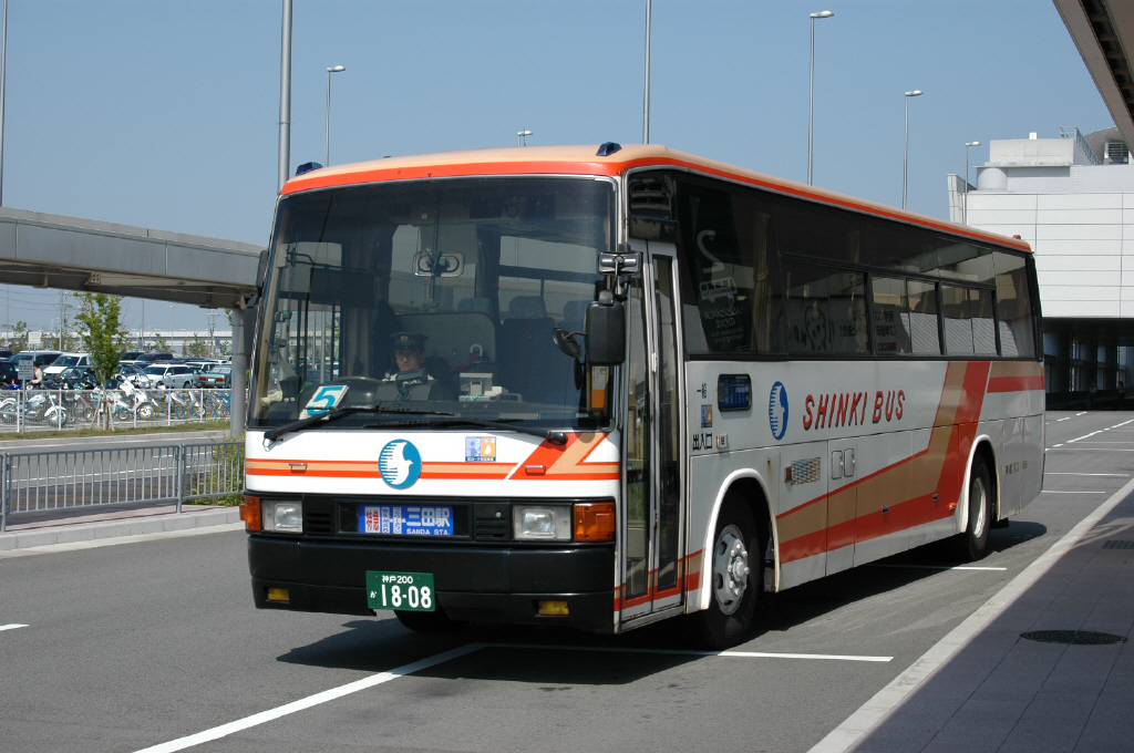 神戸空港にて撮影 2007-5-22